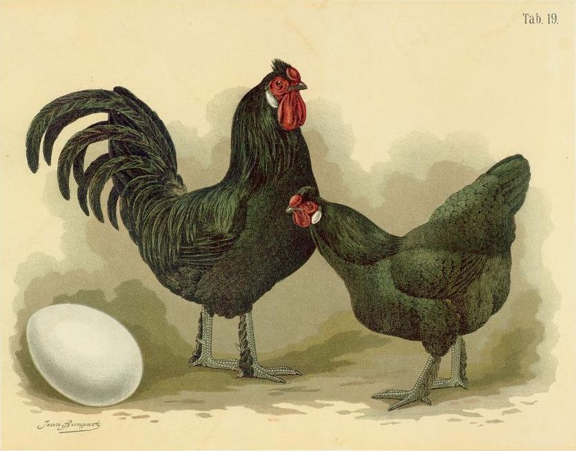 Breda-Huhn. Gallus dom. cristatus geldrianus. Breda. Poule de Breda.